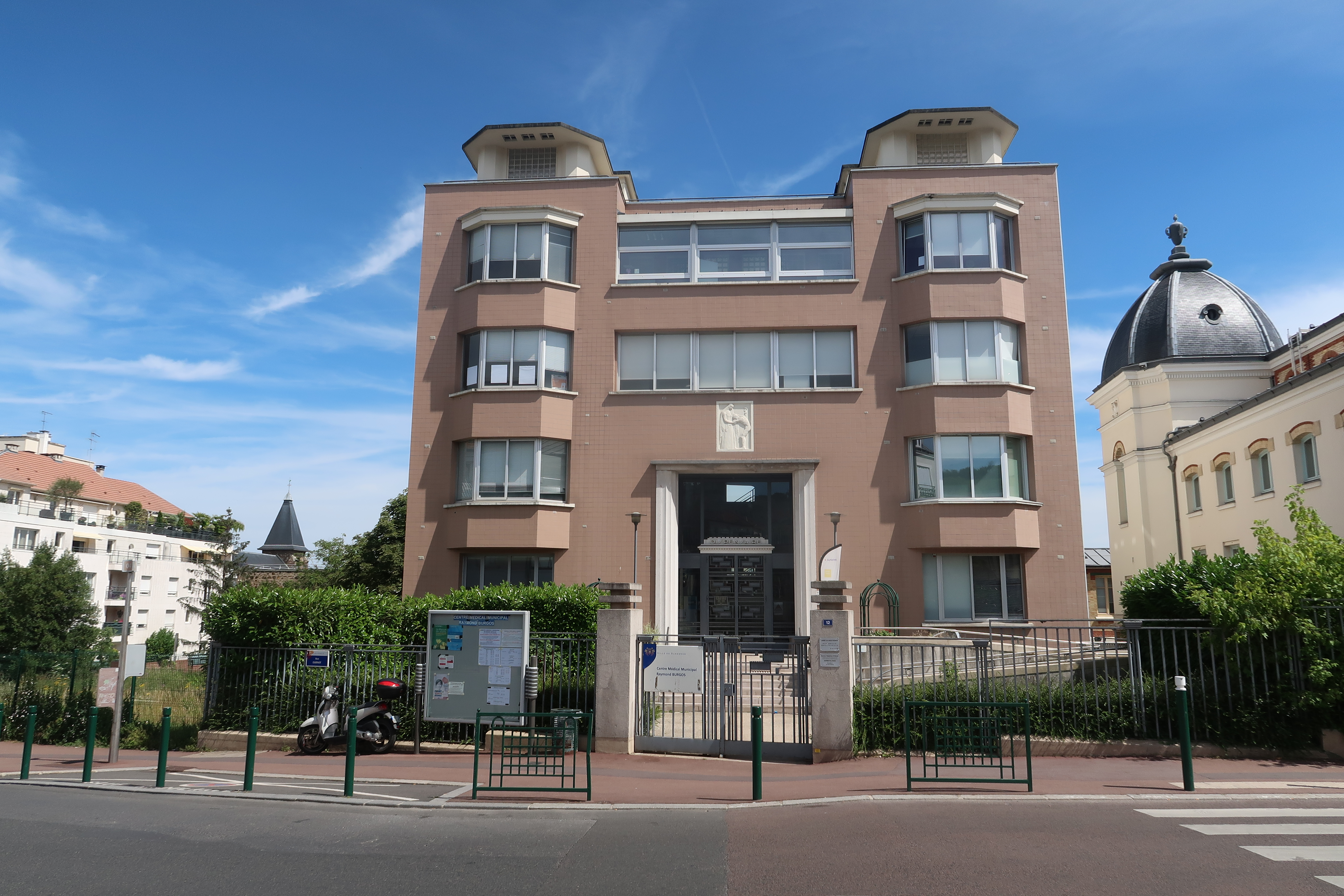 Centre médical municipal Raymond-Burgos à Suresnes (Hauts-de-Seine).